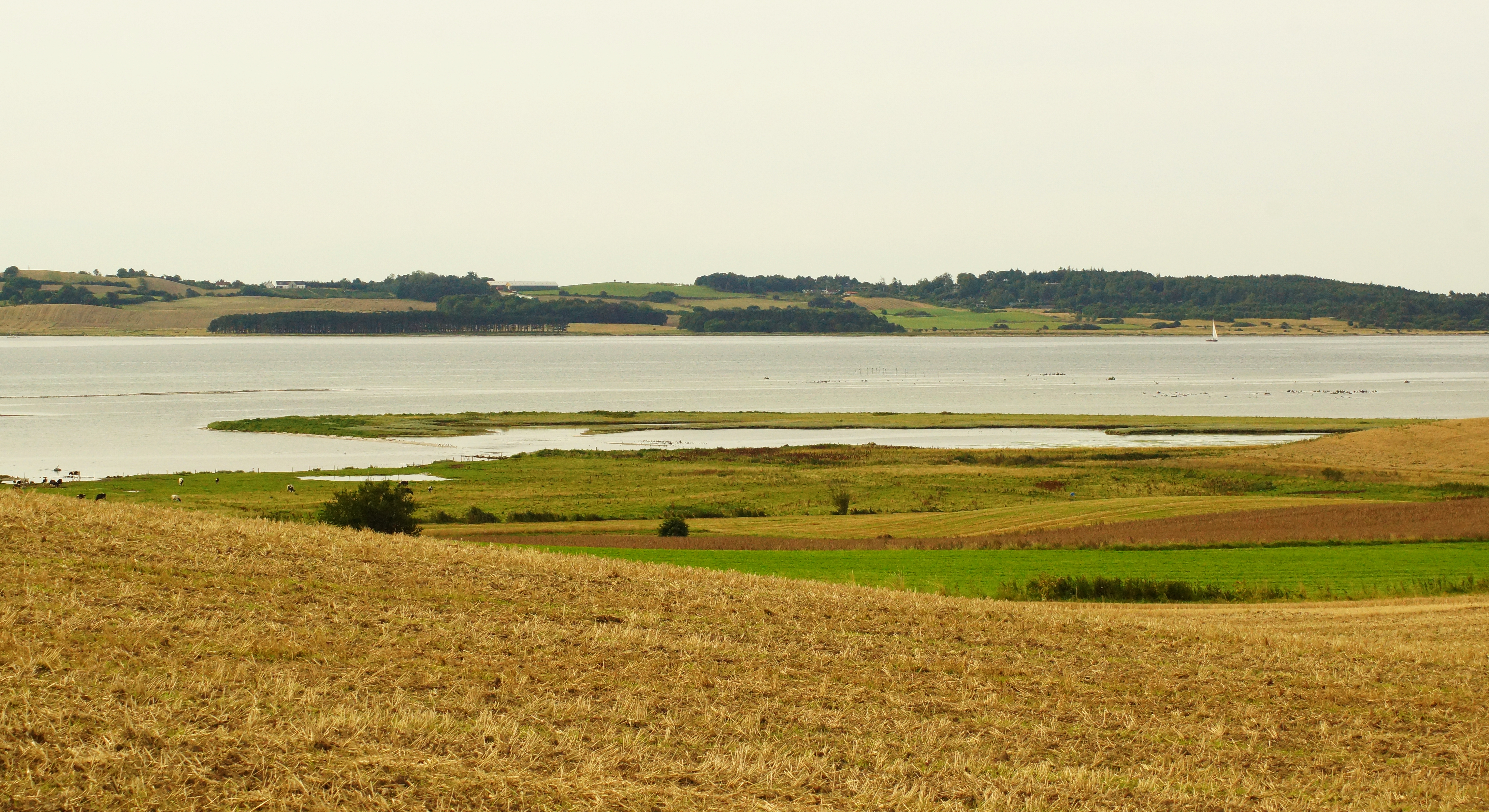 Strands Gunger i Begtrup Vig set fra nord ved Begtrup.